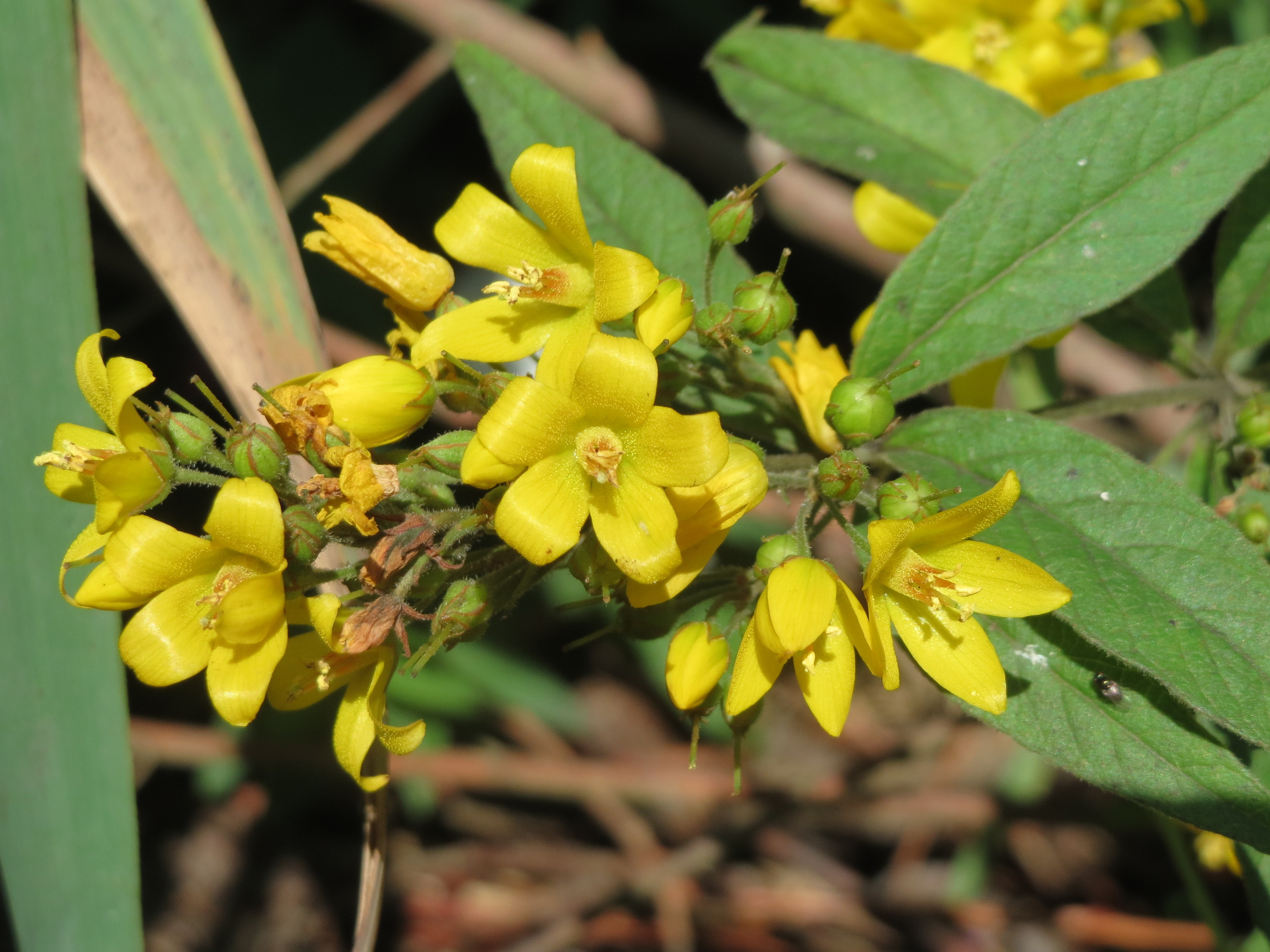 Gewöhnlicher Gilbweiderich (Lysimachia vulgaris) am Schalkenmehrener Maar